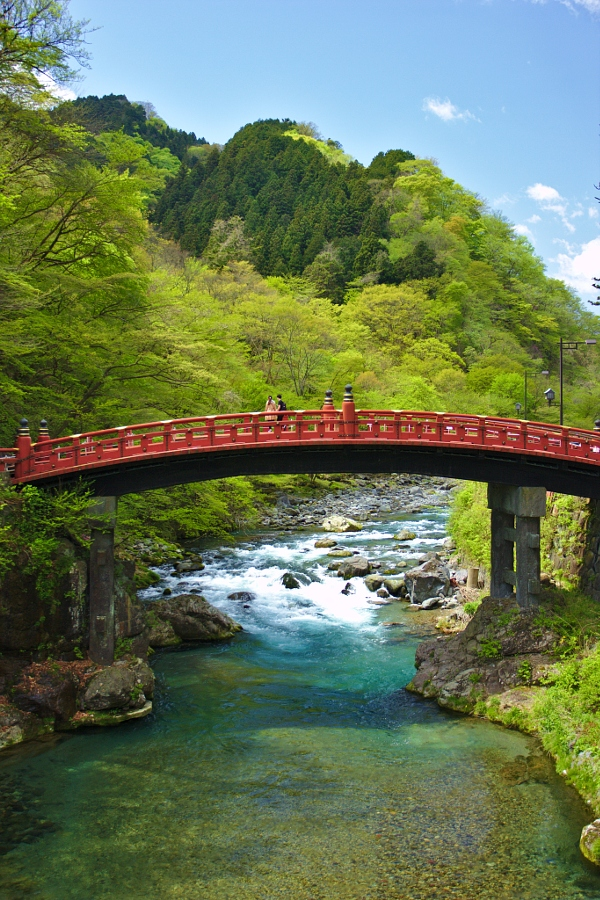 Мост Синкё в городе Никко